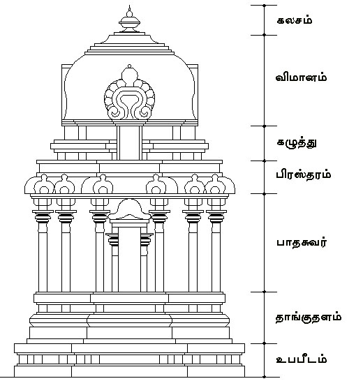 Drawn by User:Mayooranathan